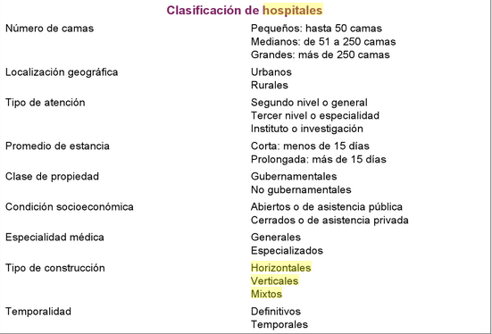 cuadro de clasificacion general de hospital